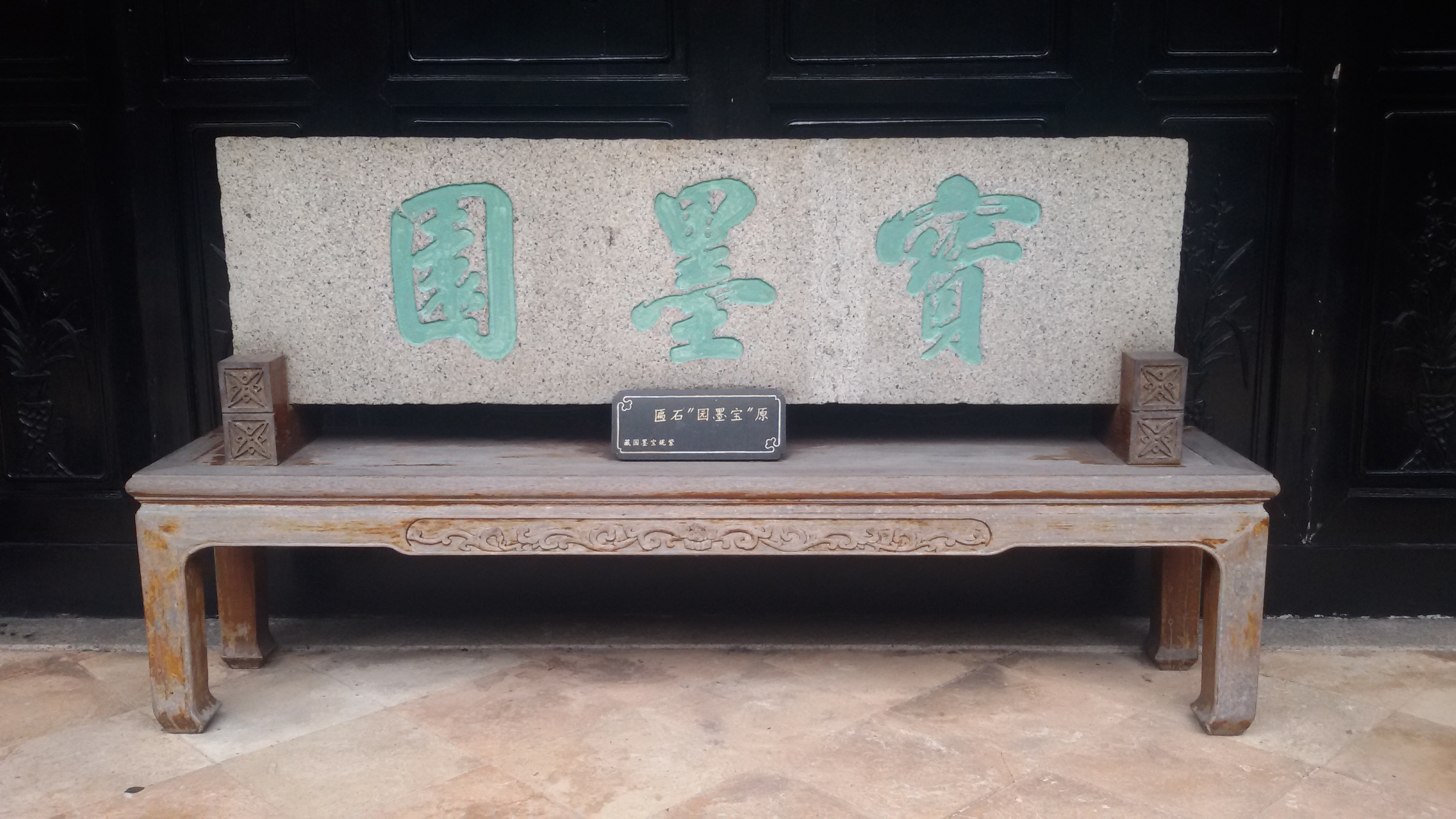 粵語: 寶墨園石匾上邊啲字